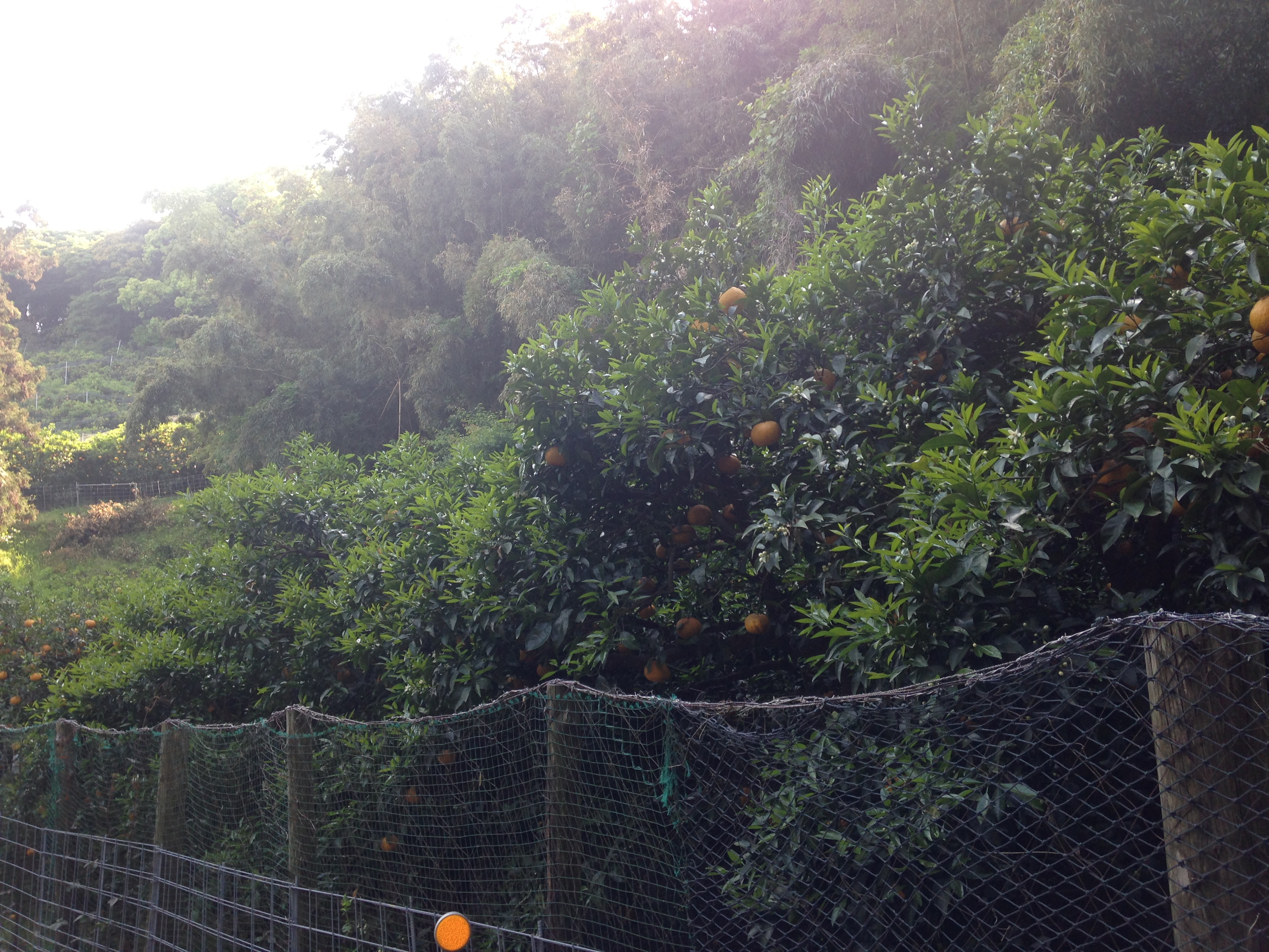 能古島でたくさん植えた甘夏